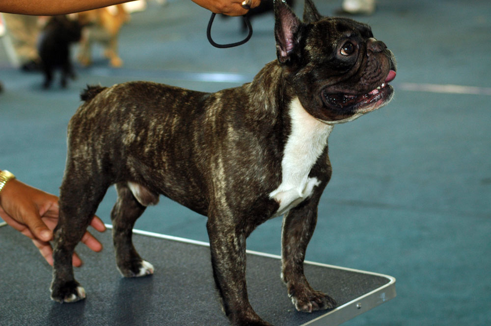 A male brindle French Bulldog.